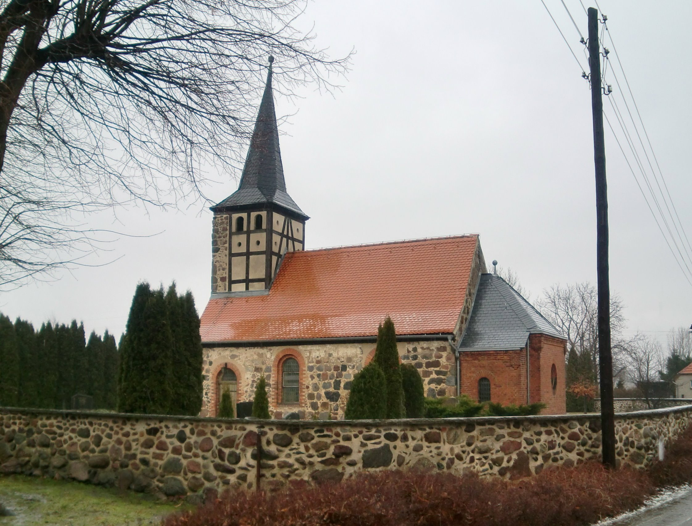 Dorfkirche Windberge, Südseite